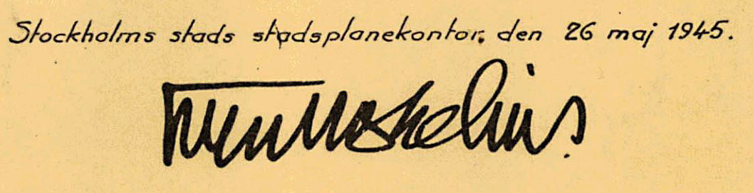 Sven Markelius signatur på en stadsplan från 1945